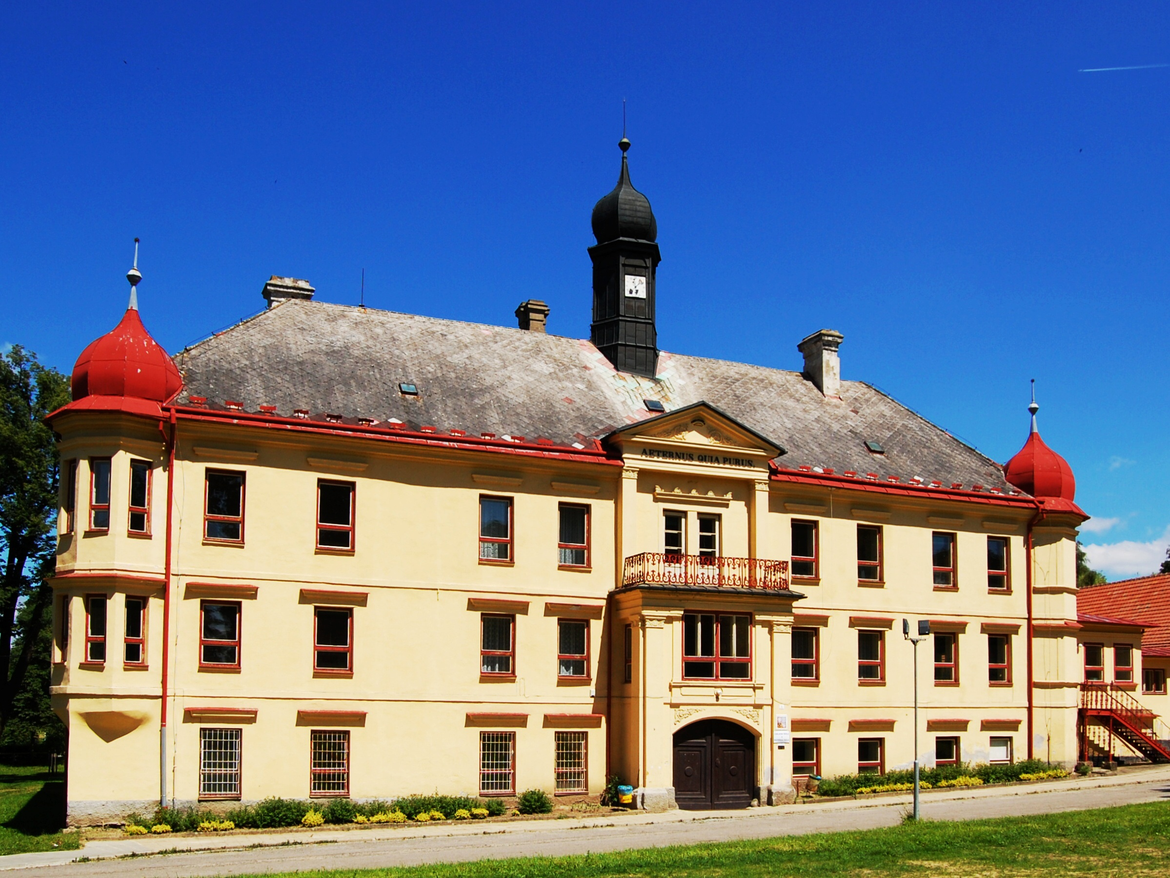 Zámek Dolní Rožínka, v obci 1, Dolní Rožínka